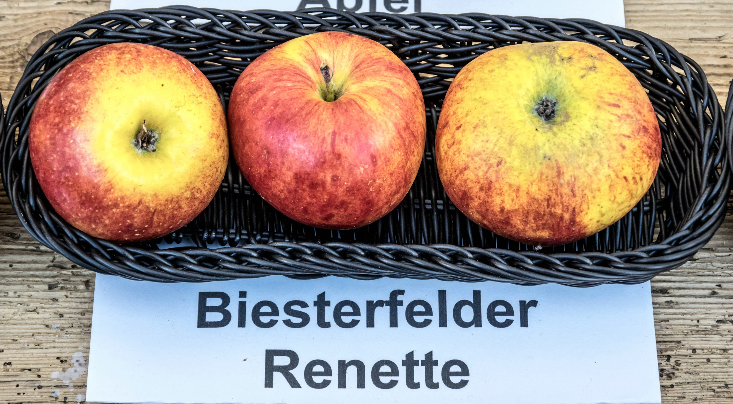 Alte Apfelsorten, von denen es im Badischen noch tragende Bäume gibt. Alle Aufnahmen au dem Oktober 2015